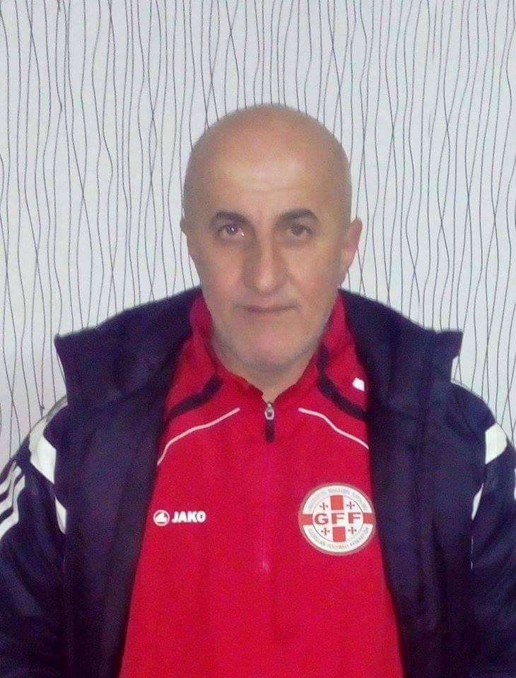 ზ